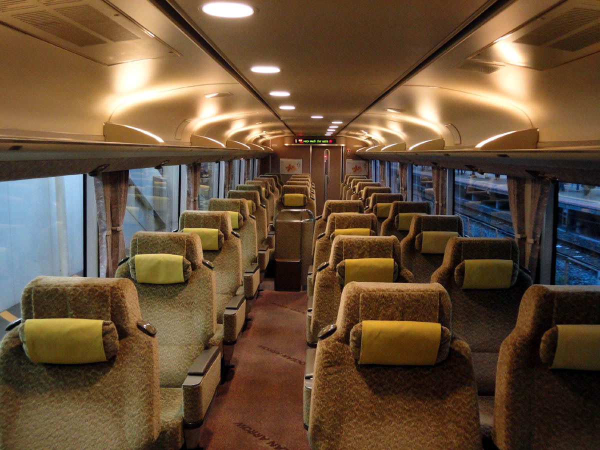 JR西日本 283系グリーン車車内